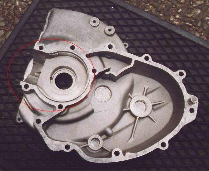 crankcase vespa 50